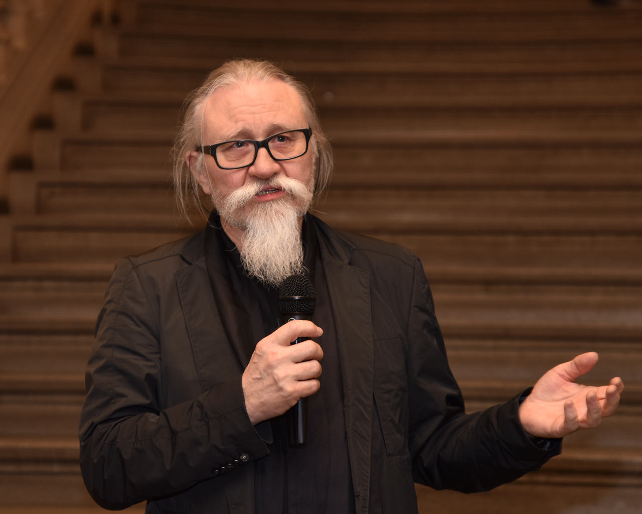 Roman Koucký (2020)